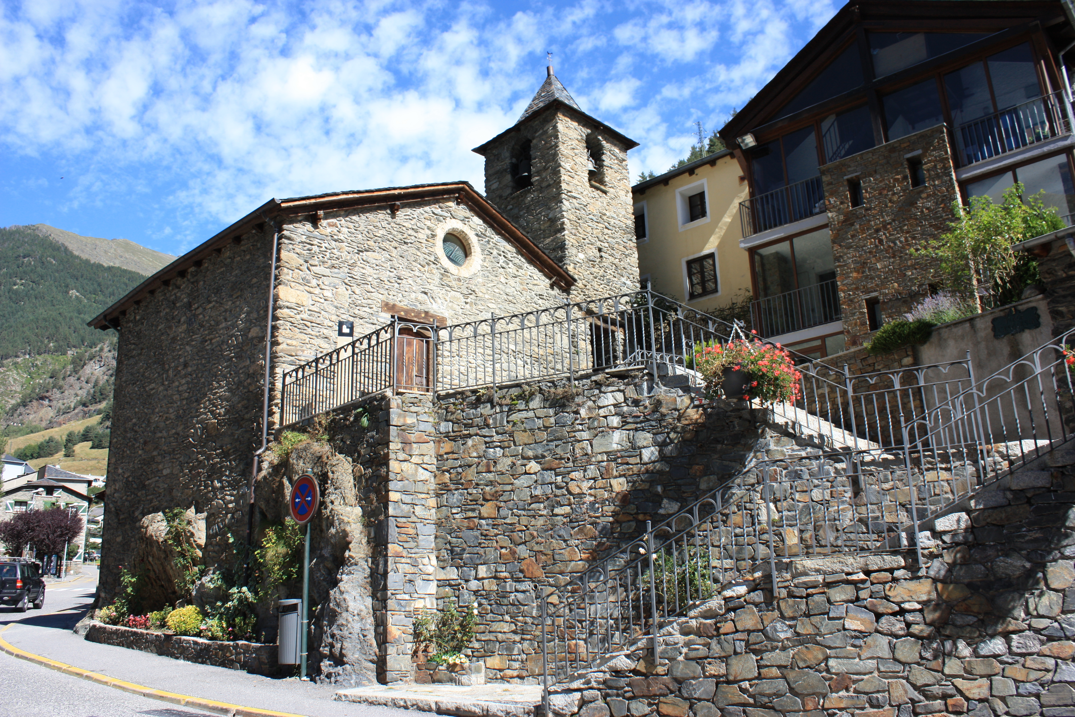 Església de Sant Andreu d'Arinsal